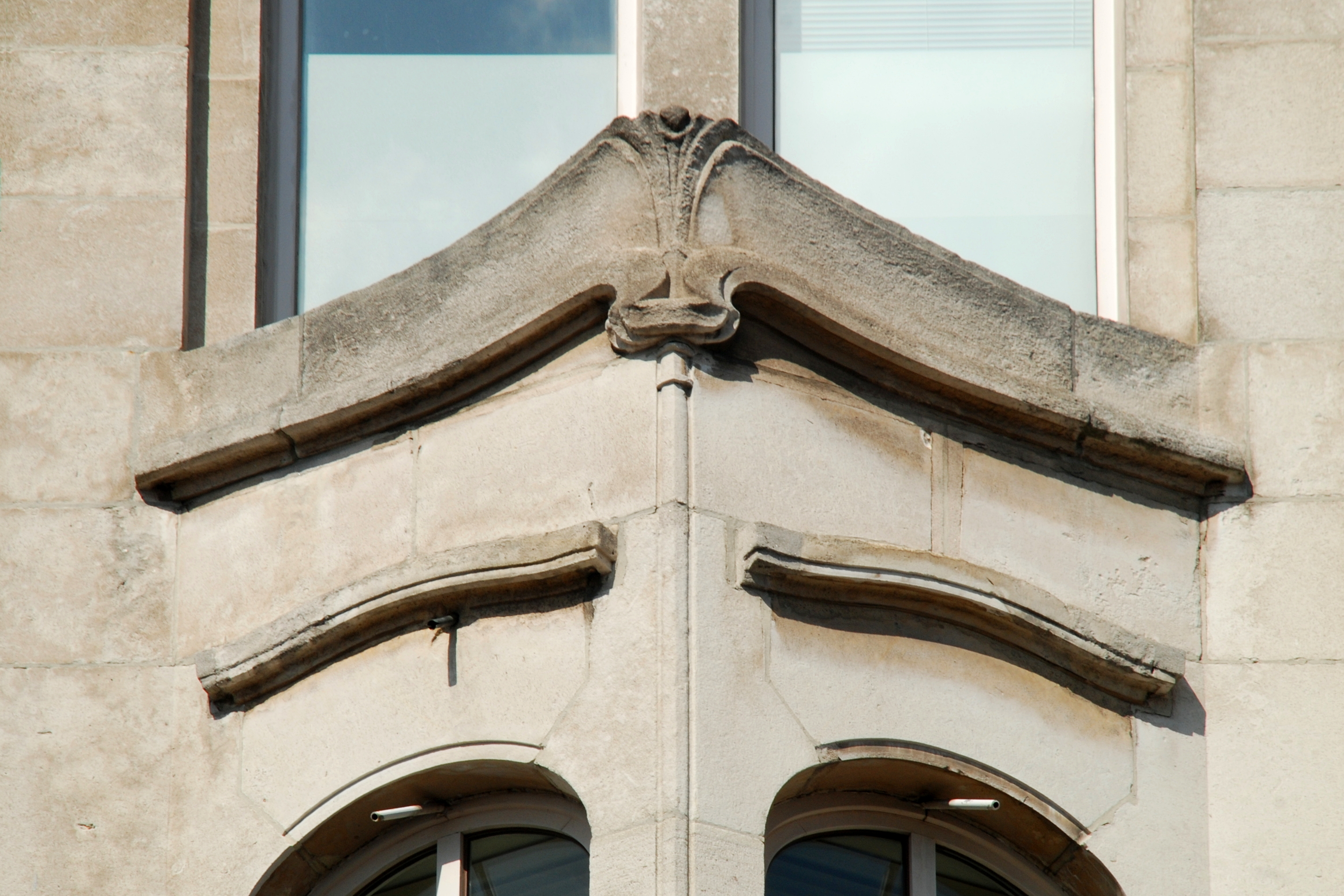 Belgique - Bruxelles - Anciens magasins Wolf